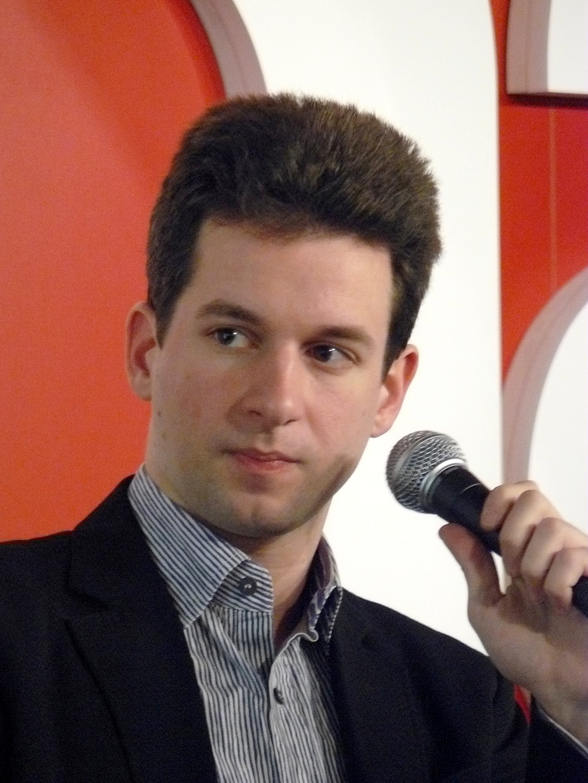 Bertrand Chamayou, pianiste, lors d'une présentation à la FNAC Montparnasse, le 17 mars 2010